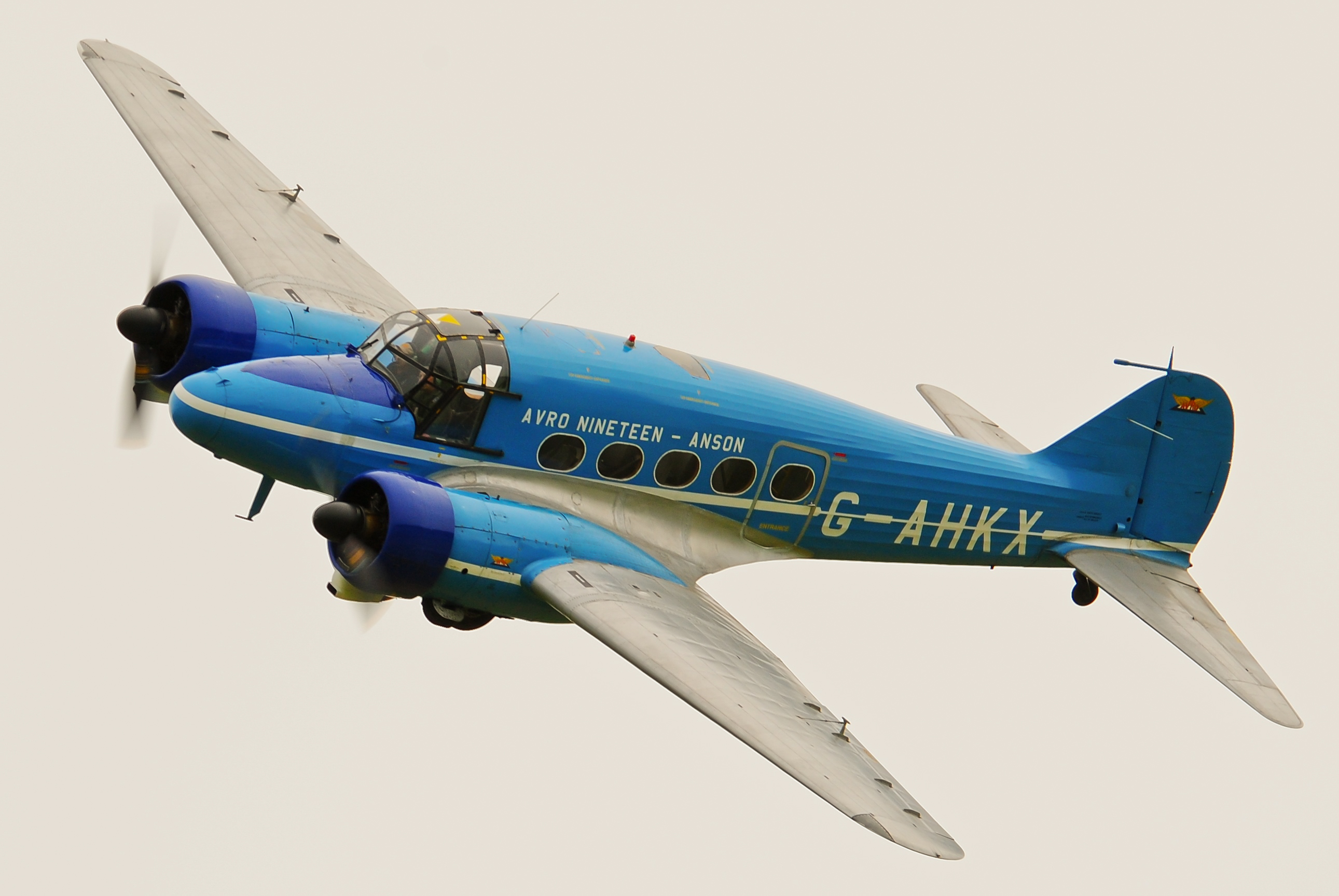 Avro 19 Anson